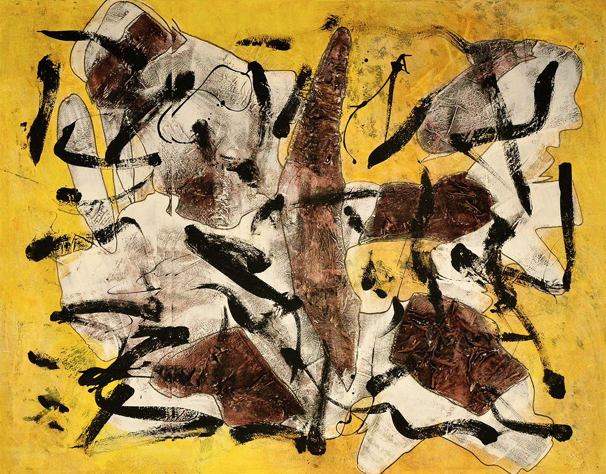 Mixed media on canvas